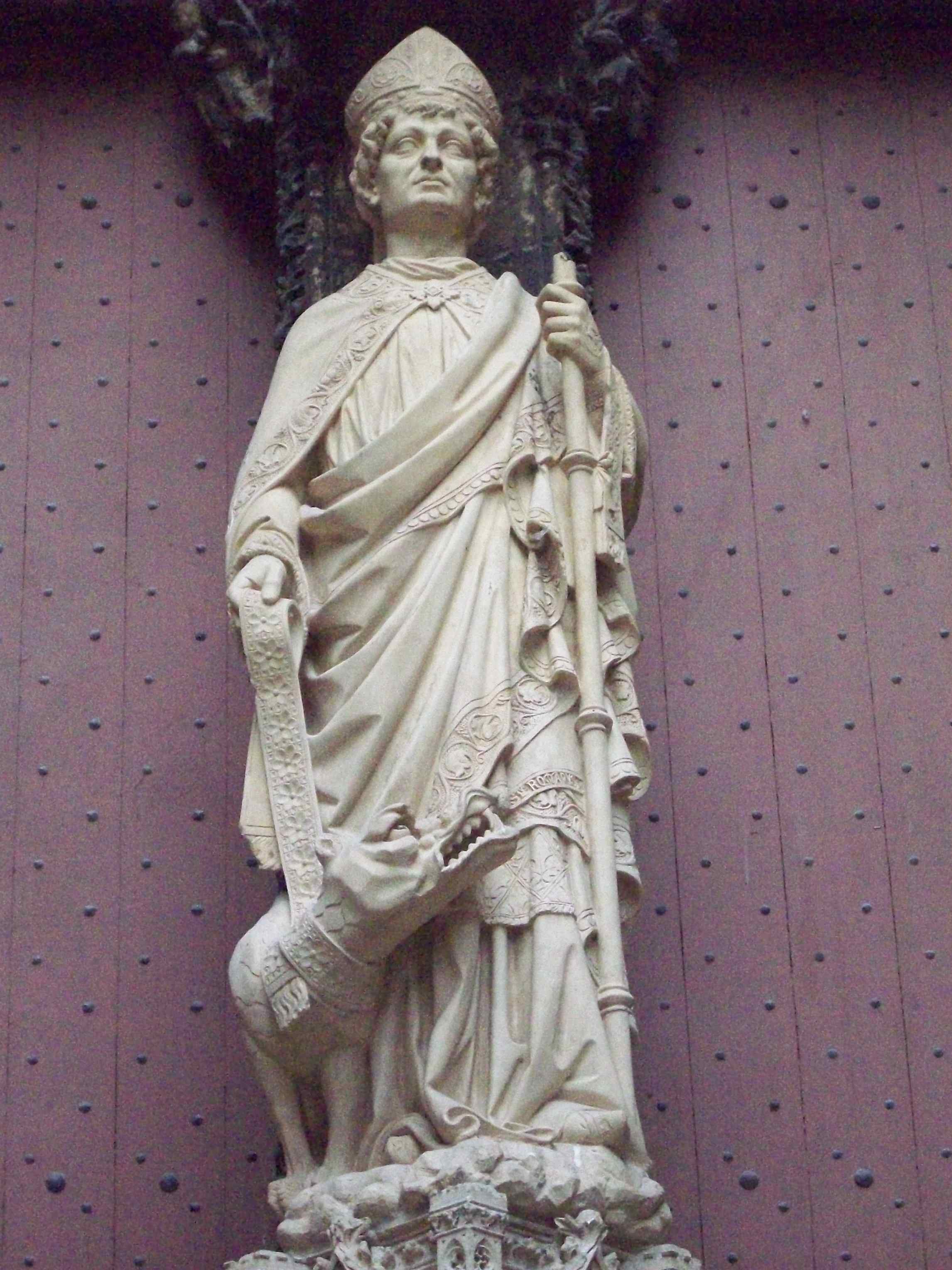 Saint Romain sur le trumeau du portail des Libraires de la cathédrale.